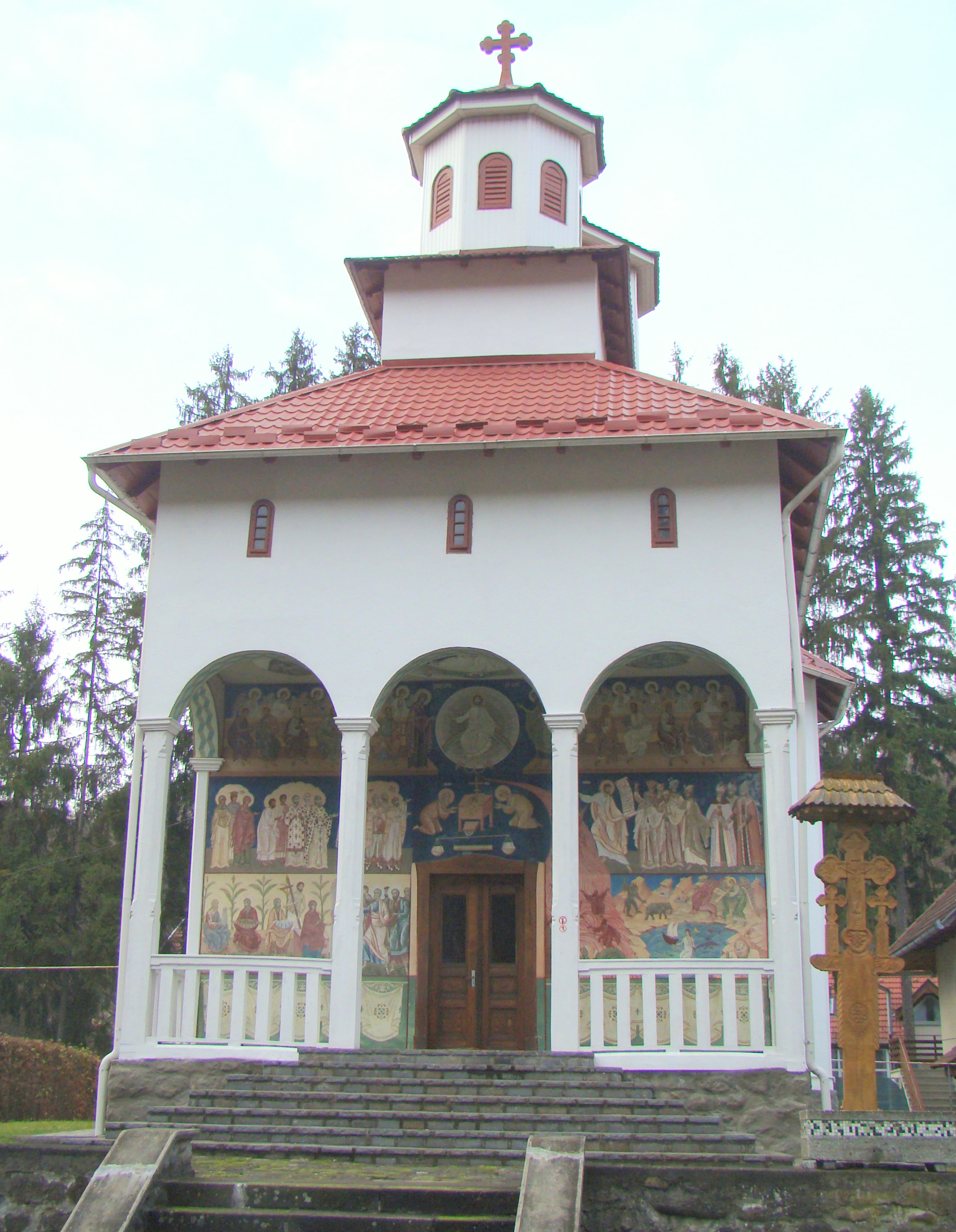 Biserica de lemn Adormirea Maicii Domnului din Sovata, judeţul Mureş